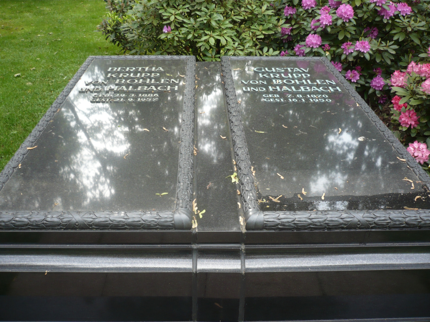 Grabmal von Bertha und Gustav Krupp von Bohlen und Halbach auf dem Friedhof Bredeney in Essen